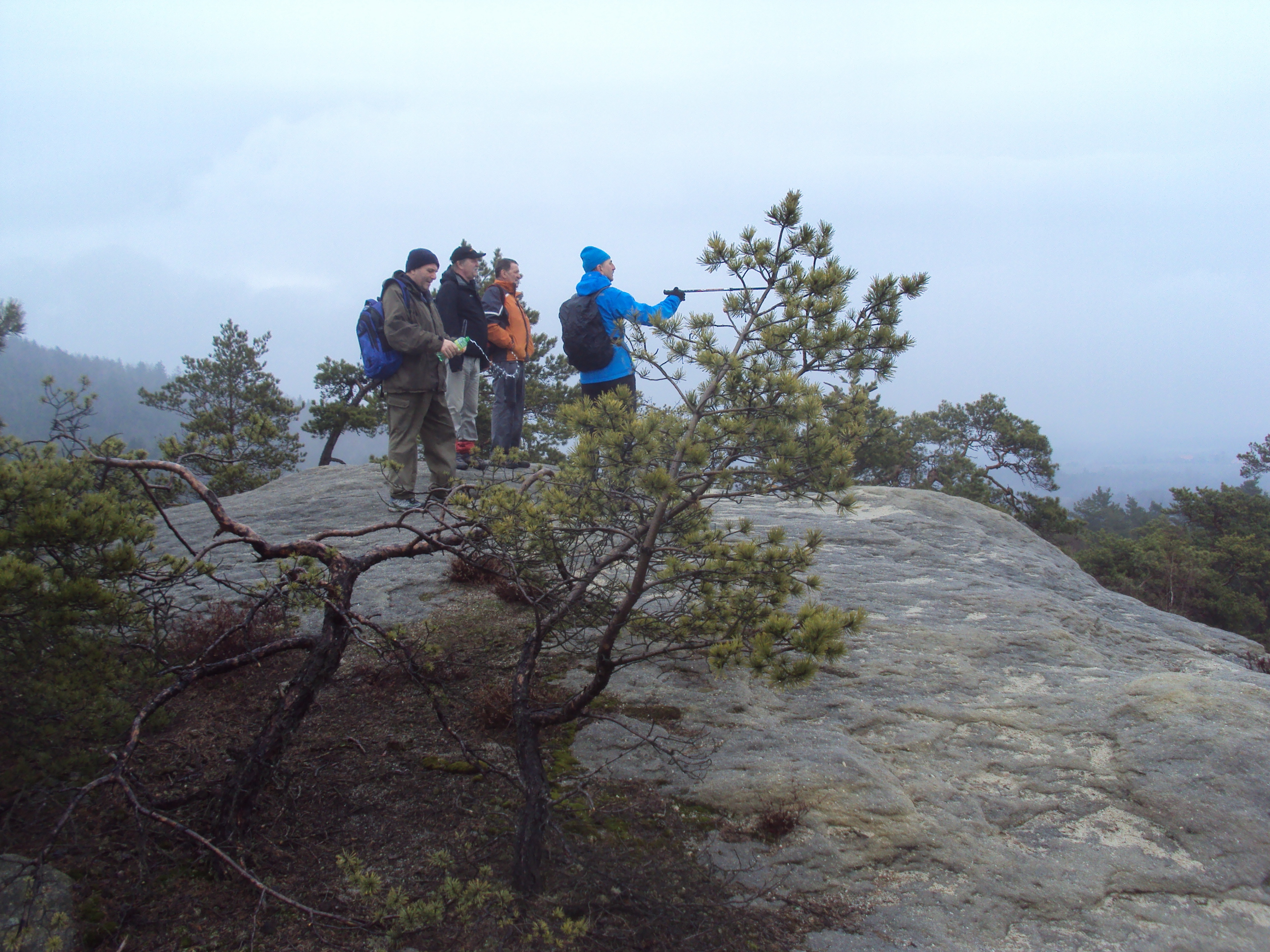 Vrcholová fotka Malého Vlhoště v mlze, Malý a Velký jsou dohromady společná přírodní rezervace